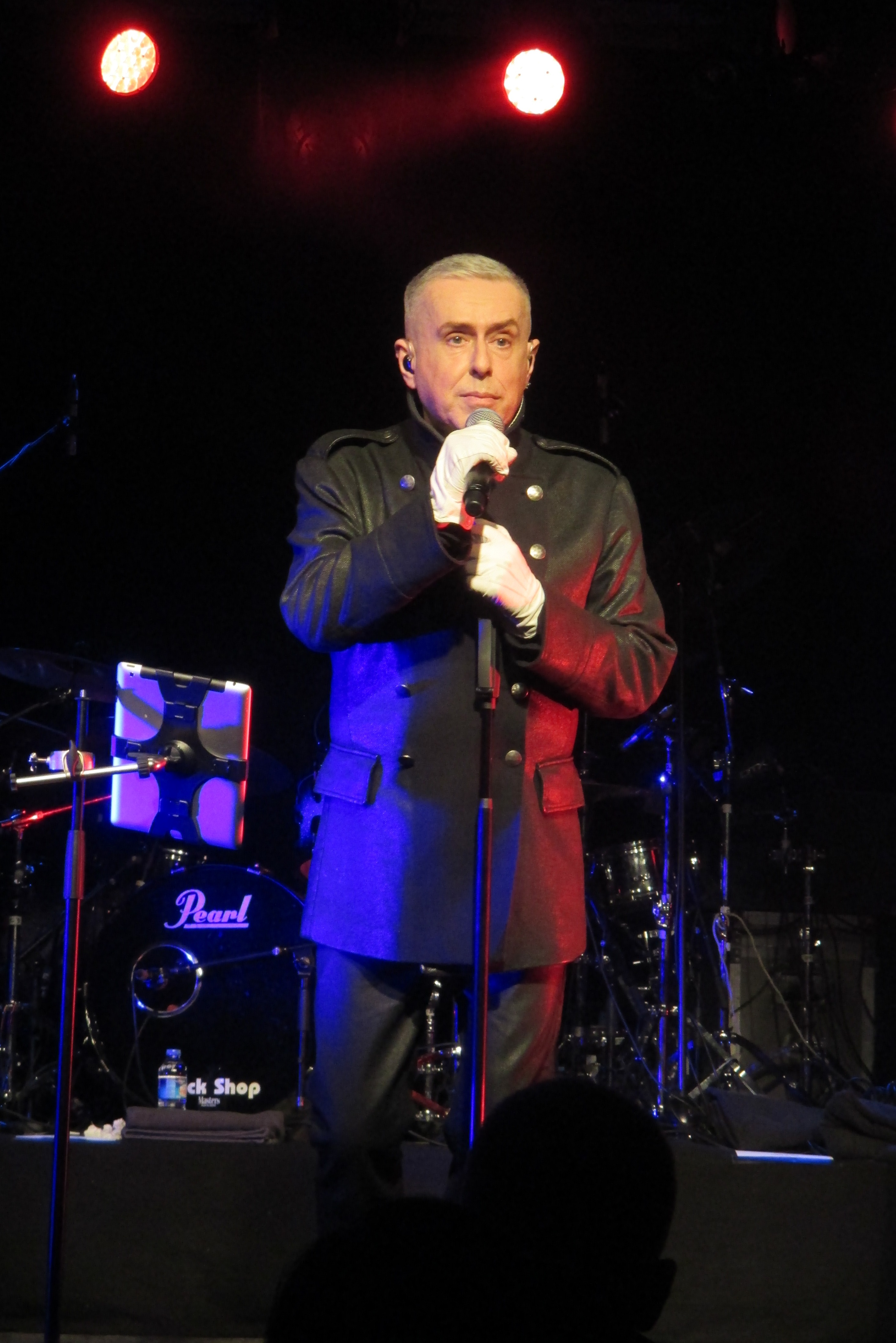 Holly Johnson, Konzert im Astra Kulturhaus, Berlin